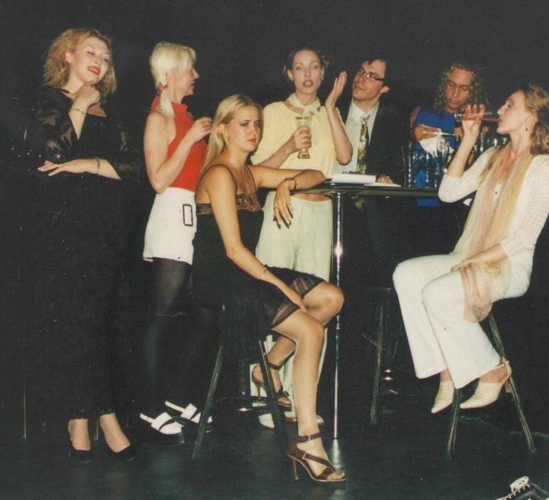 Режиссёр и актриса Ольга Лысак и члены ее труппы. Фестиваль "Майские чтения", театральный центр "Голосова 20", Тольятти. Россия.